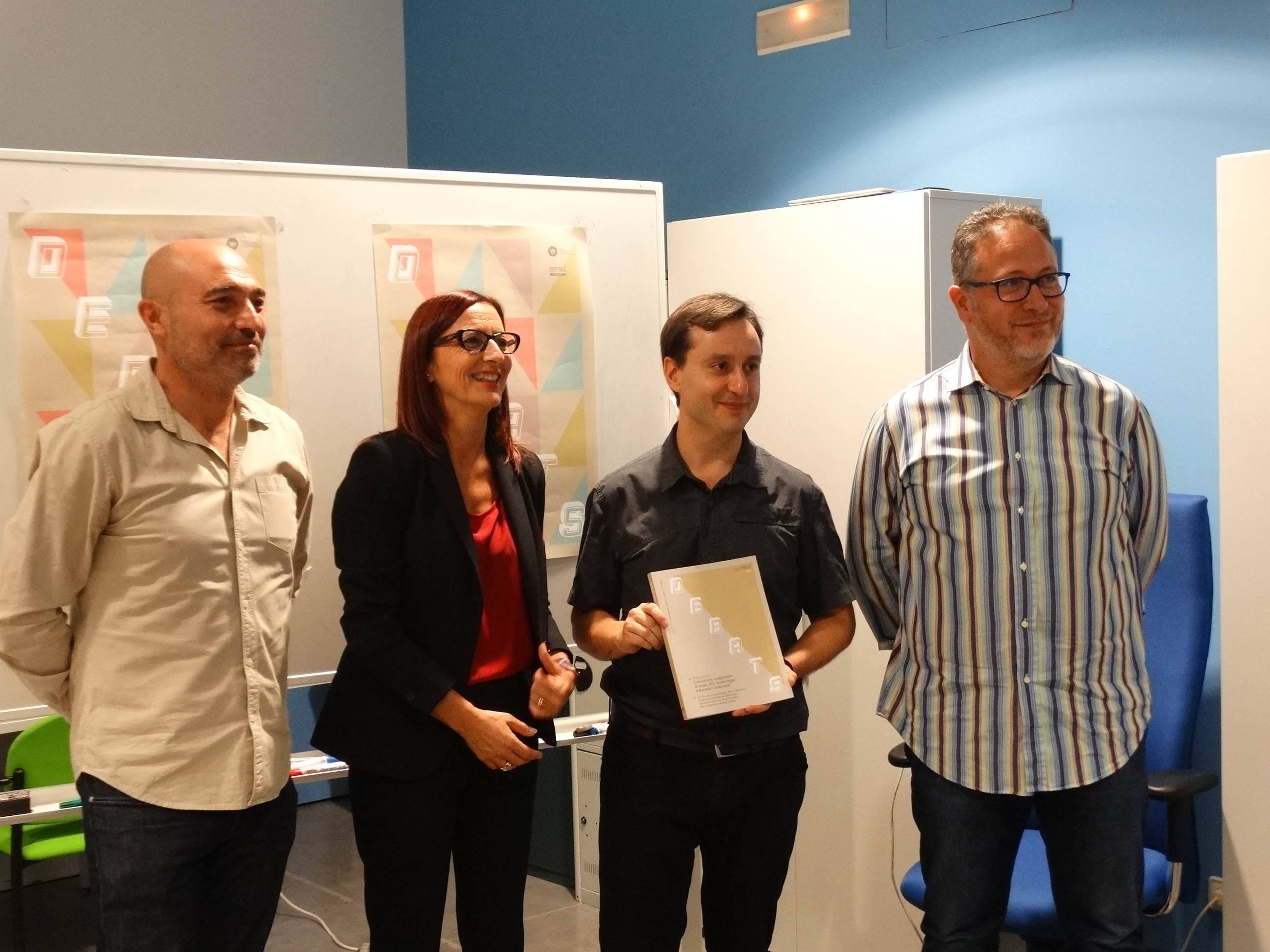 Roda de premsa per a presentar el número 130 de la Revista Debats, la primera de la nova etapa.